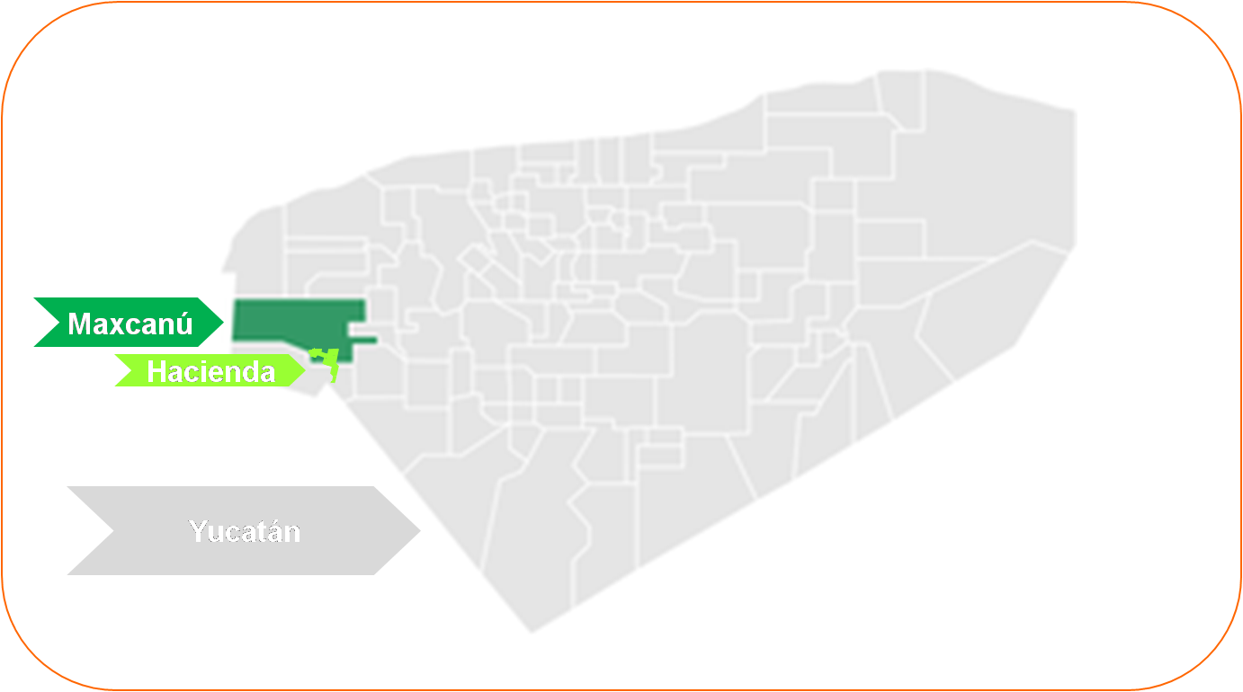 ubicacion de la hacienda Chactún dentro del estado de Yucatán